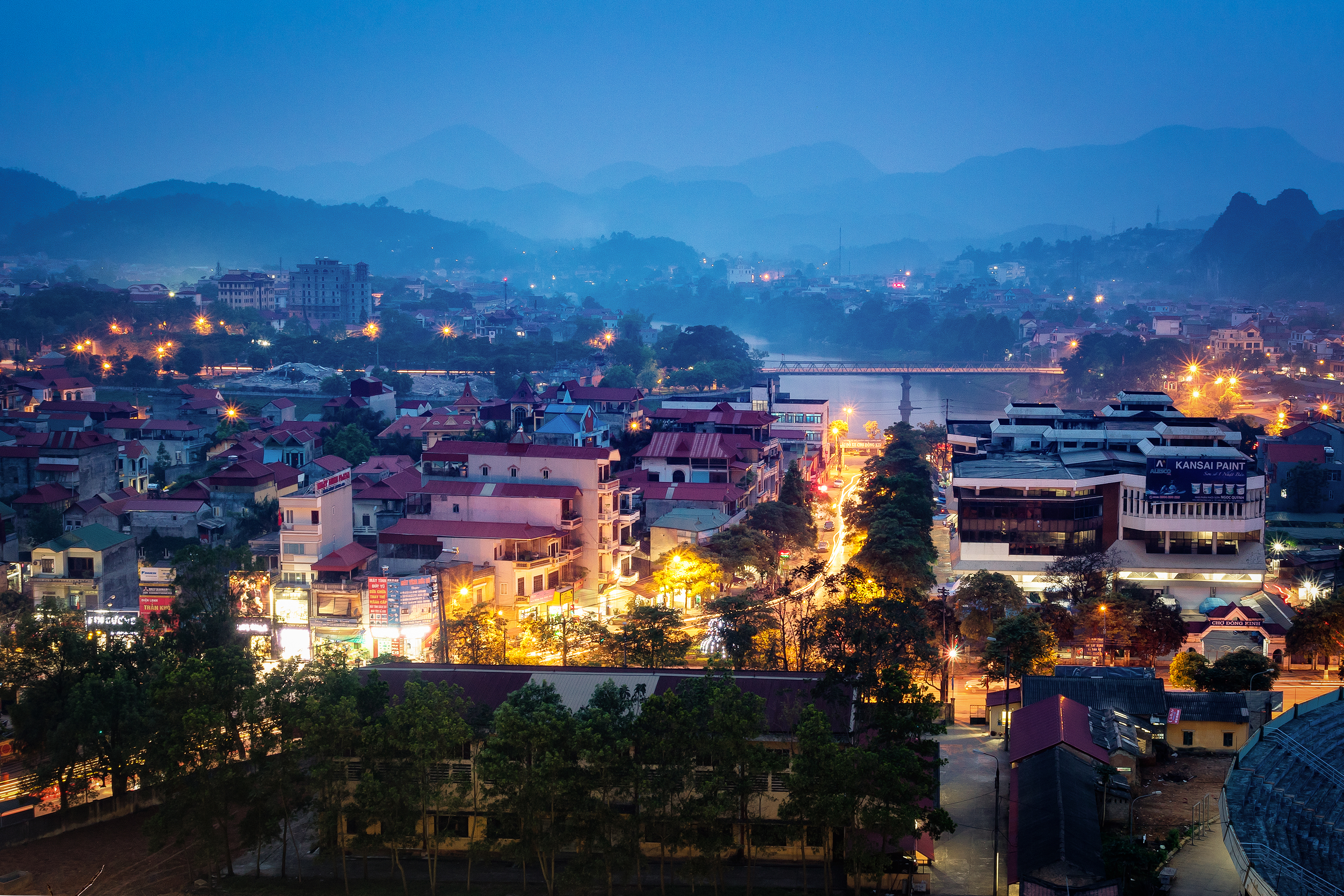 Thành phố Lạng Sơn (Việt Nam) về đêm.